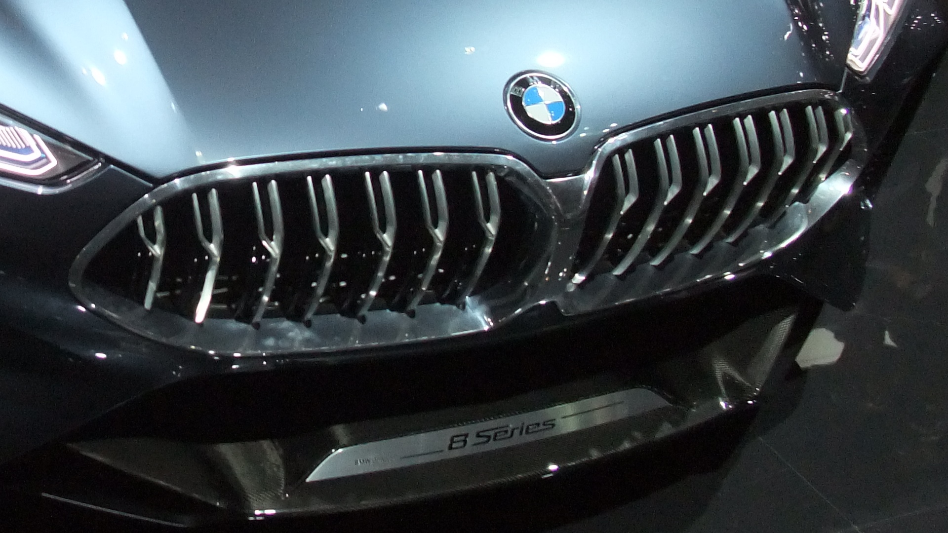 Kidney Grille